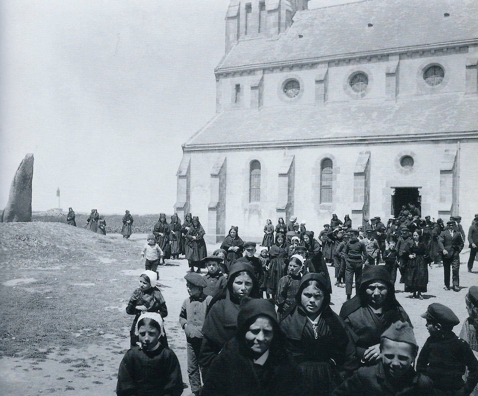 Sortie de la messe à l'Île de Sein [les femmes portent la tenue traditionnelle, la jibilinenn, une coiffe de drap noir] (photographie de Jacques de Thézac, vers 1930).